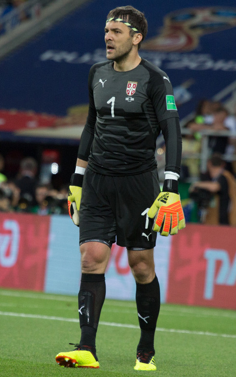 Сборная Бразилии оставляет Сербию за бортом ЧМ-2018 и выходит в плей-офф